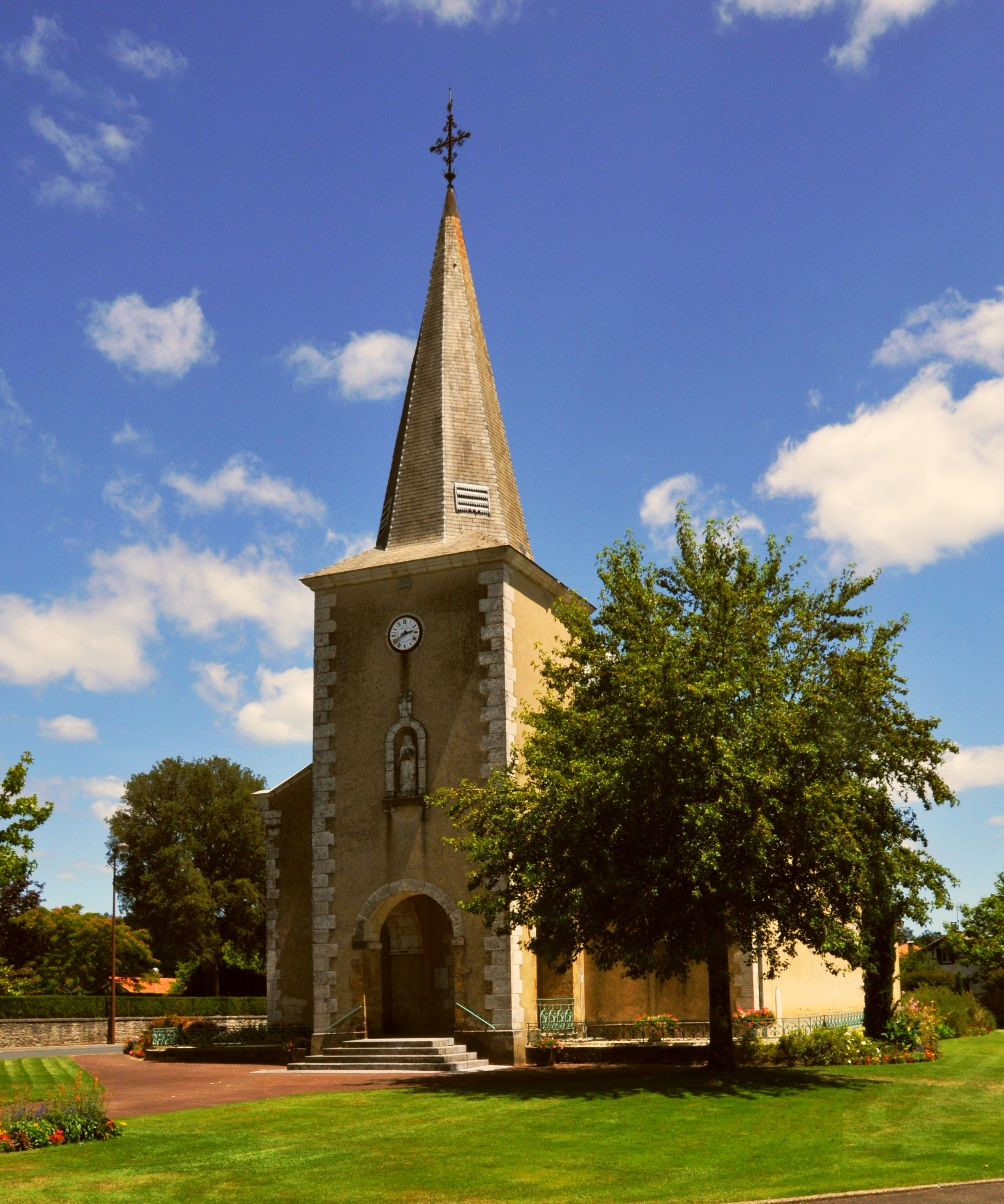 Herm (Landes), Kirche